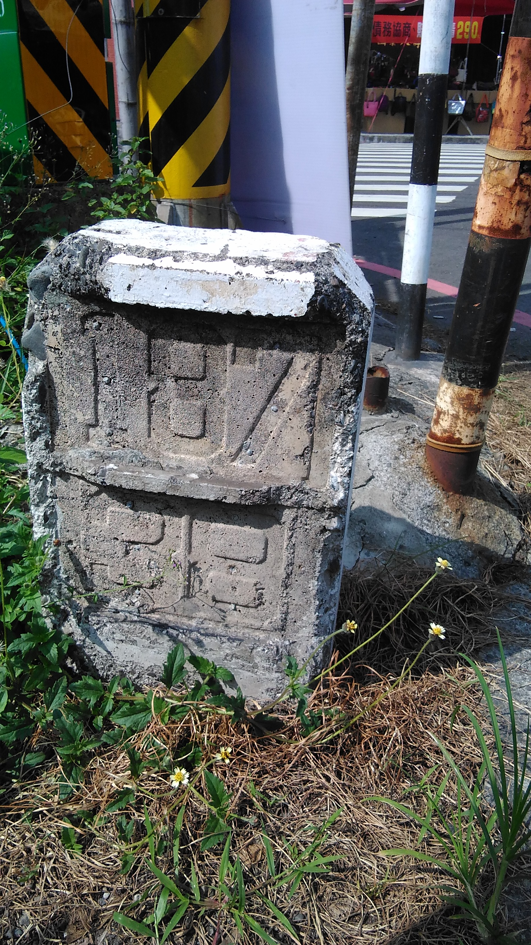 位於縣道187號上，水泥製的38k里程碑